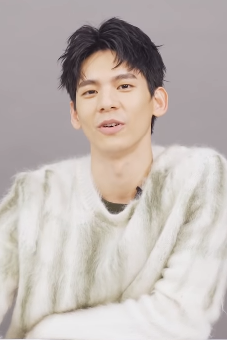 ELLEX林柏宏挑戰化學指考題同時快問快答